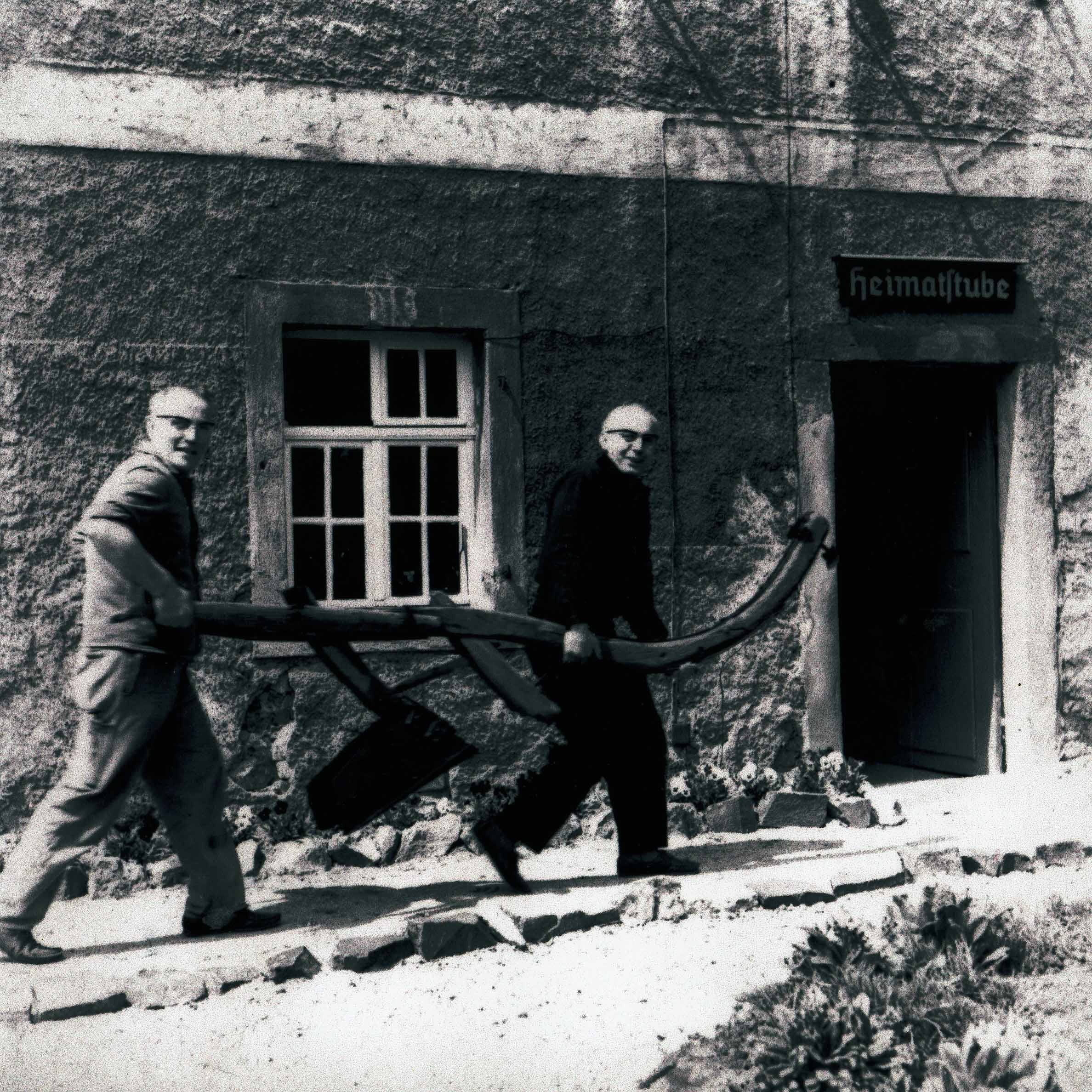 Umzug der Exponate ins Heimatmuseum Mutzschen 1972